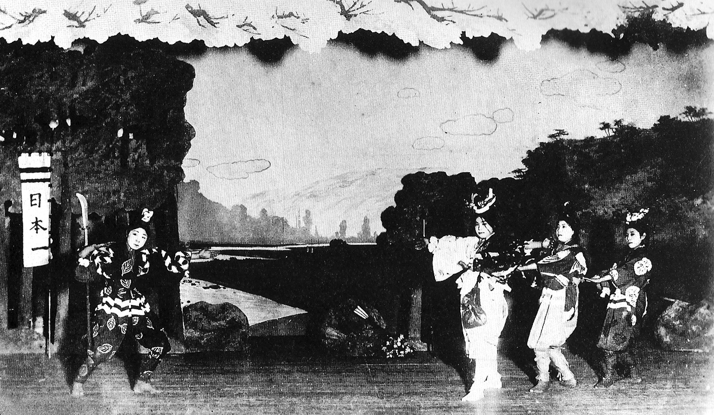 宝塚第1回公演「ドンブラコ」（桃太郎）。左から犬：八十島楫子・桃太郎：高峰妙子・雉：由良道子・猿：雲井浪子